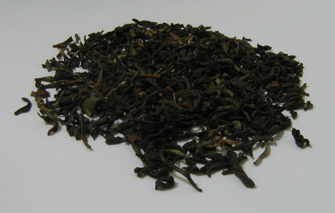 Loose leaf Darjeeling tea